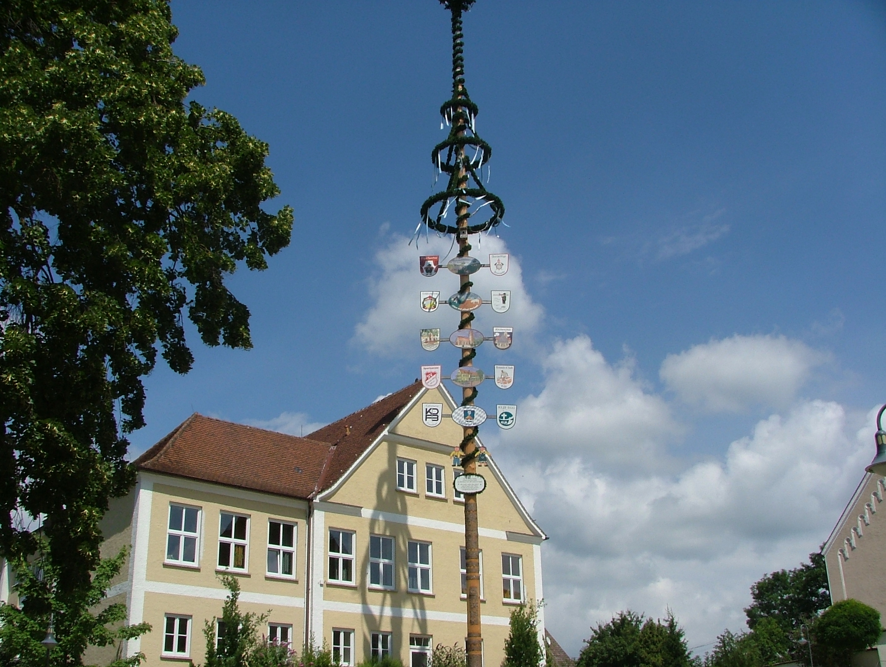 Egg an der Günz